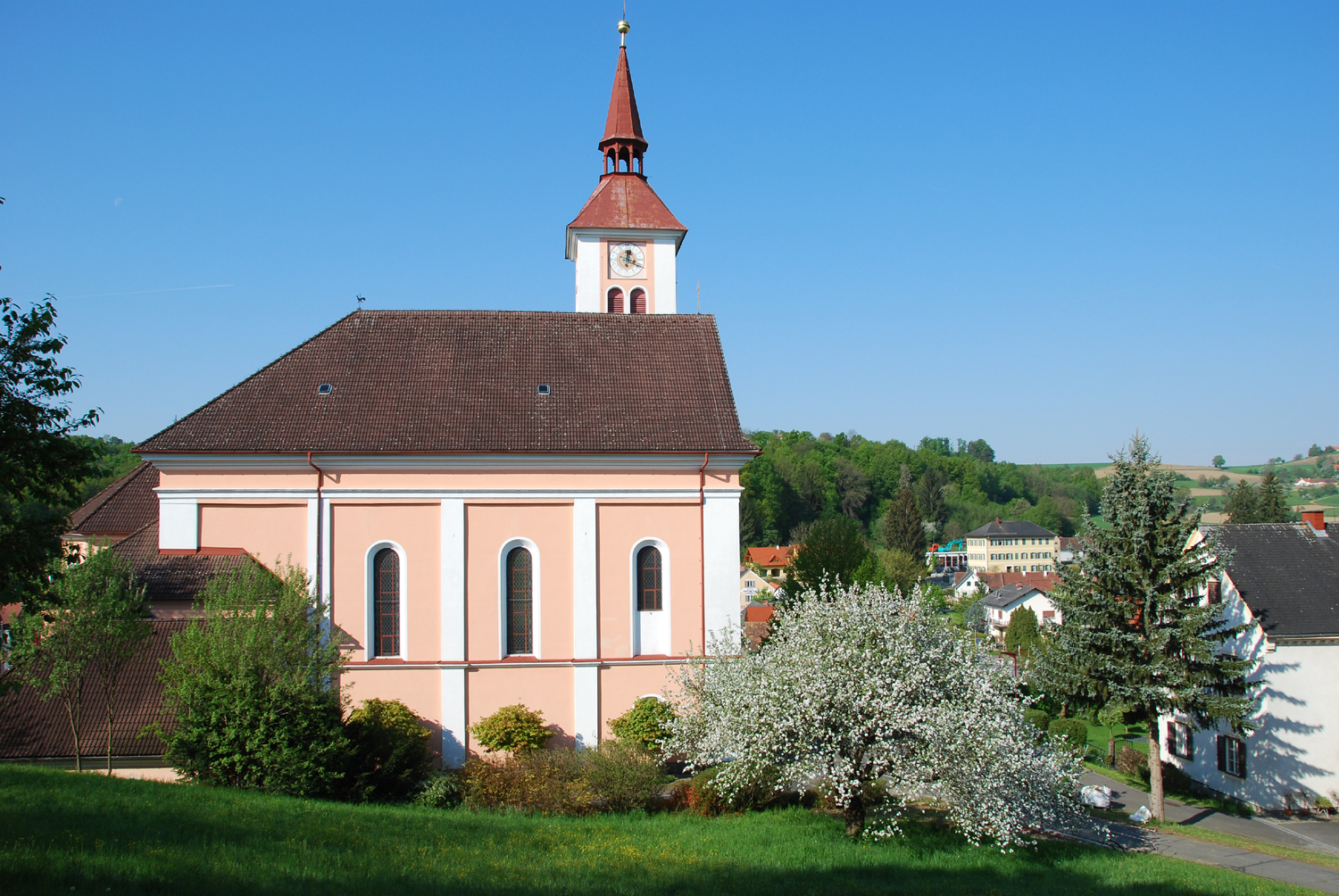 Pfarrkirche hl. Heinrich, Frühling in Unterlamm